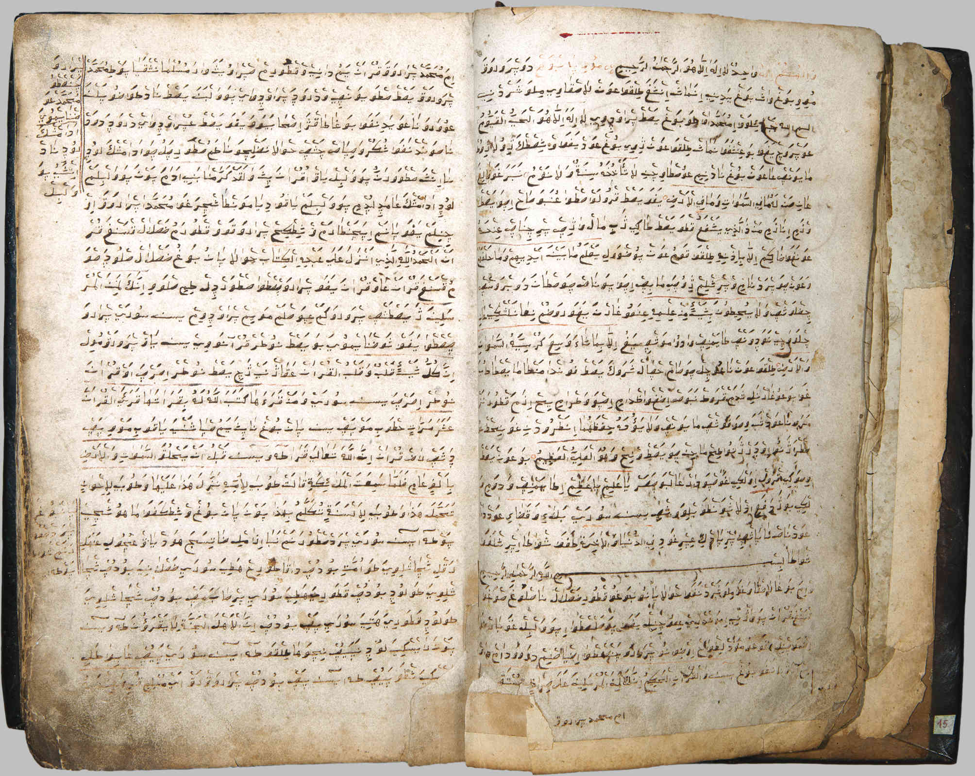 Кітаб Другая палова XVIII cт. Папера, рукапiс Нацыянальная бiблiятэка Беларусi